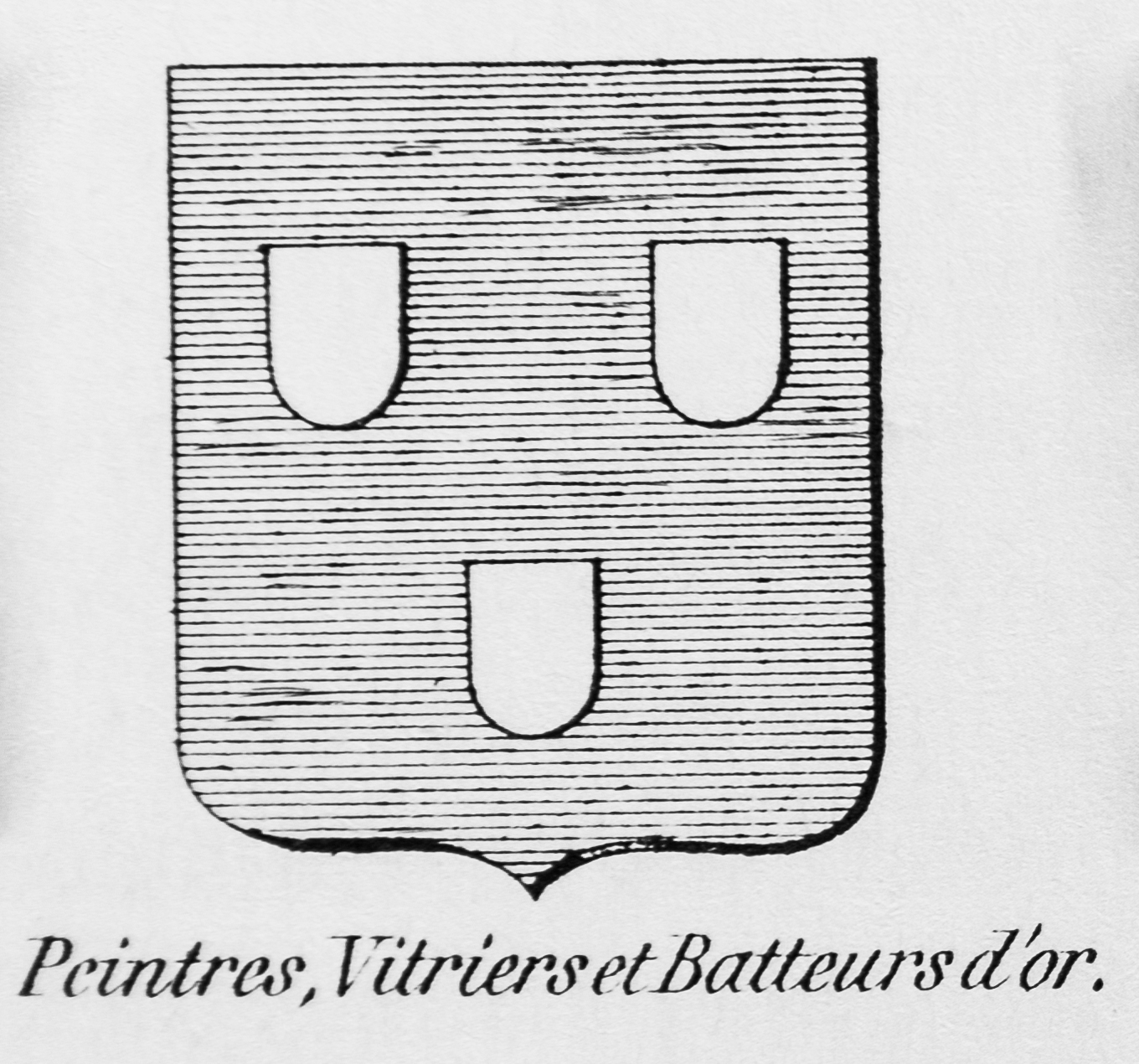 Blason métier peintres, vitriers et batteurs d'or - Nations de Bruxelles